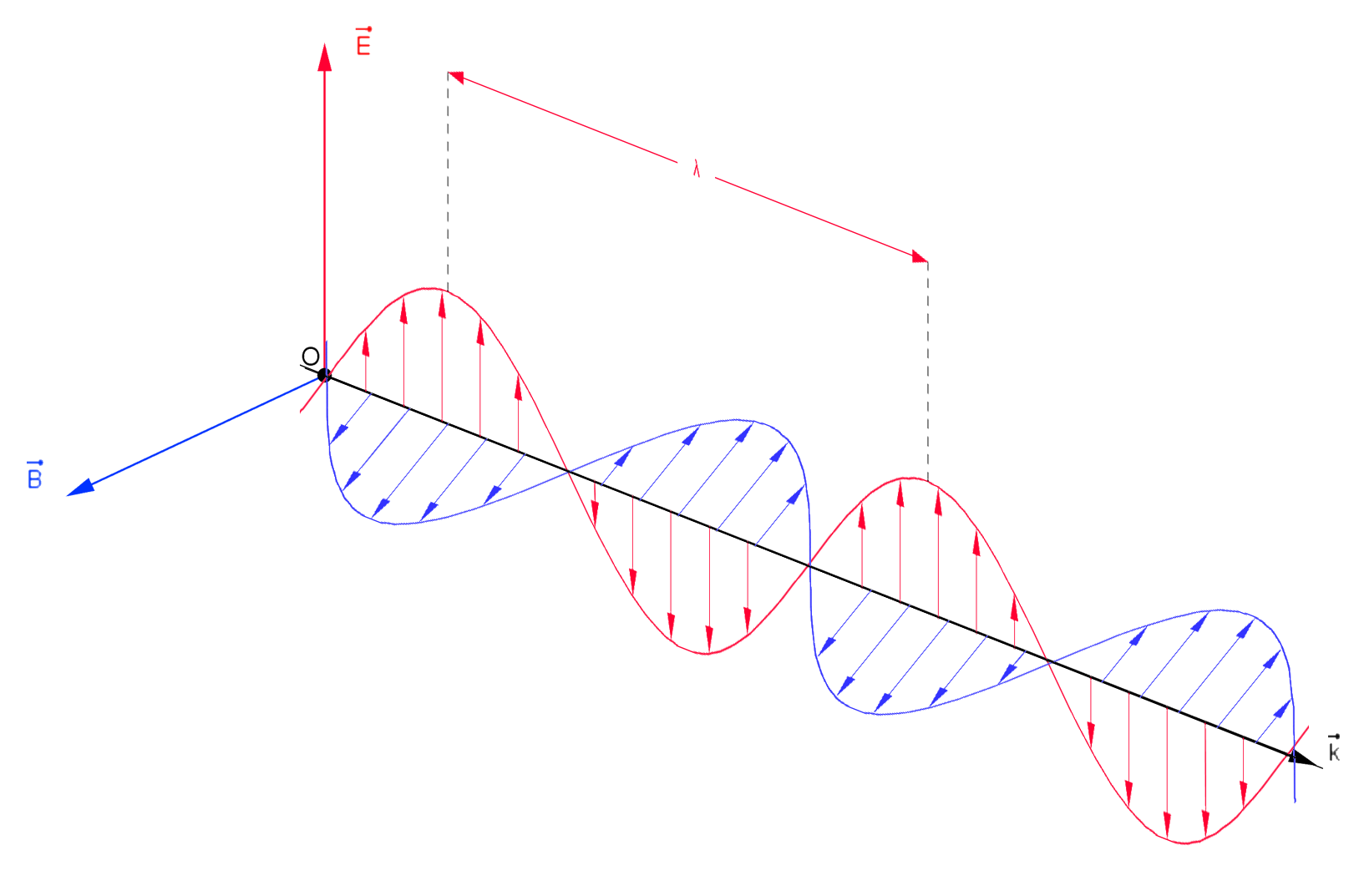 Schéma d'une onde électromagnétique